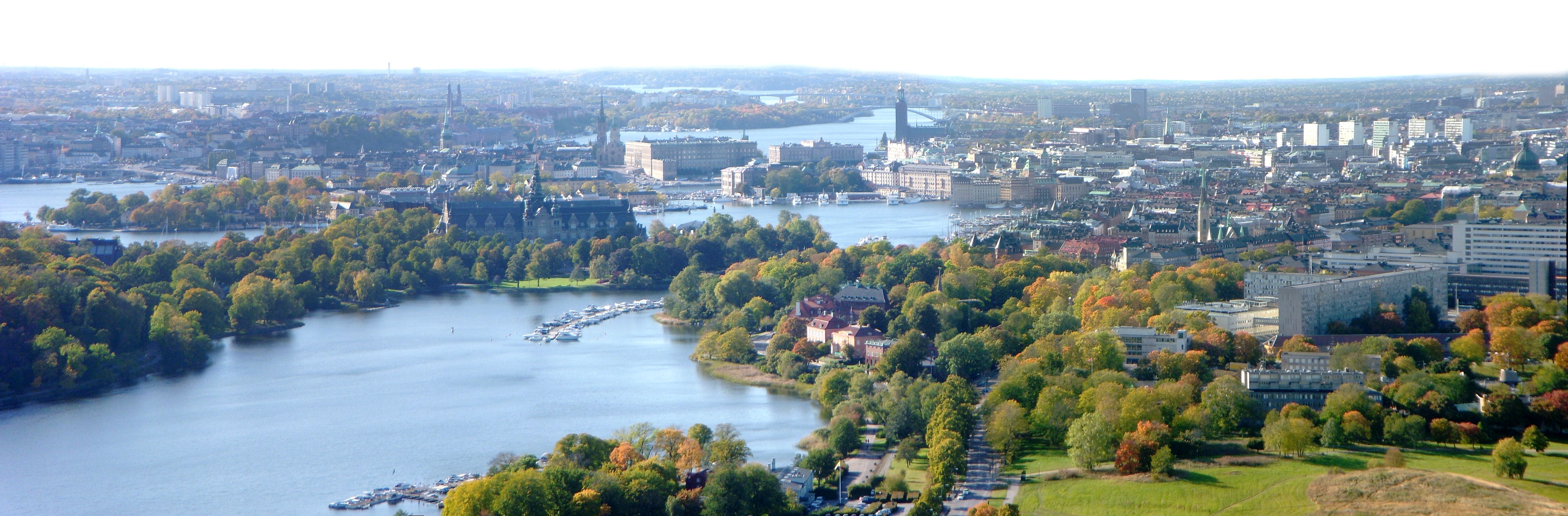 Stockholmspanorama från Kaknästornet